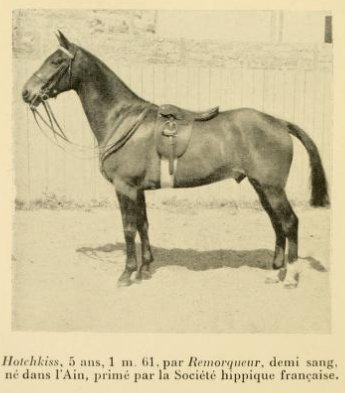 Demi-sang de l'Ain dans Les races chevalines française et anglaises par le comte de Comminges Marie-Aiymery, J.B Robert, Saumur,1910